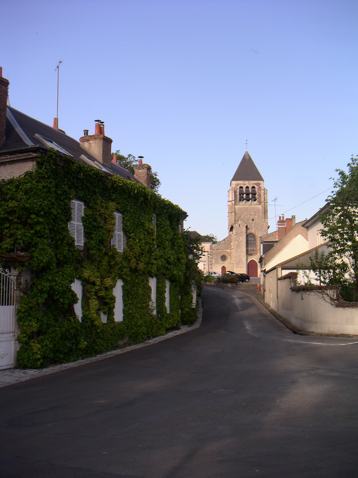 Église de St Jean de Braye.